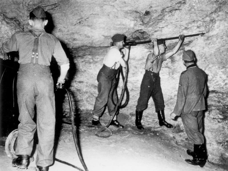 Die Karstschulungsstätte Pottenstein/Oberfranken Ein Bilderatlas mit Erläuterungen Zusammengestellt von SS-Standartenführer Dr. Brand. Die SS-Karst-Festungspioniere haben die Aufgabe, vom Gegner ausgenützte ober- und unterirdische Karsterscheinungen mit ihren Spezialkampfmitteln zu überwinden bzw. die Karstphänomene in eigene Verteidigungsstellungen zweckentsprechend einzubauen.